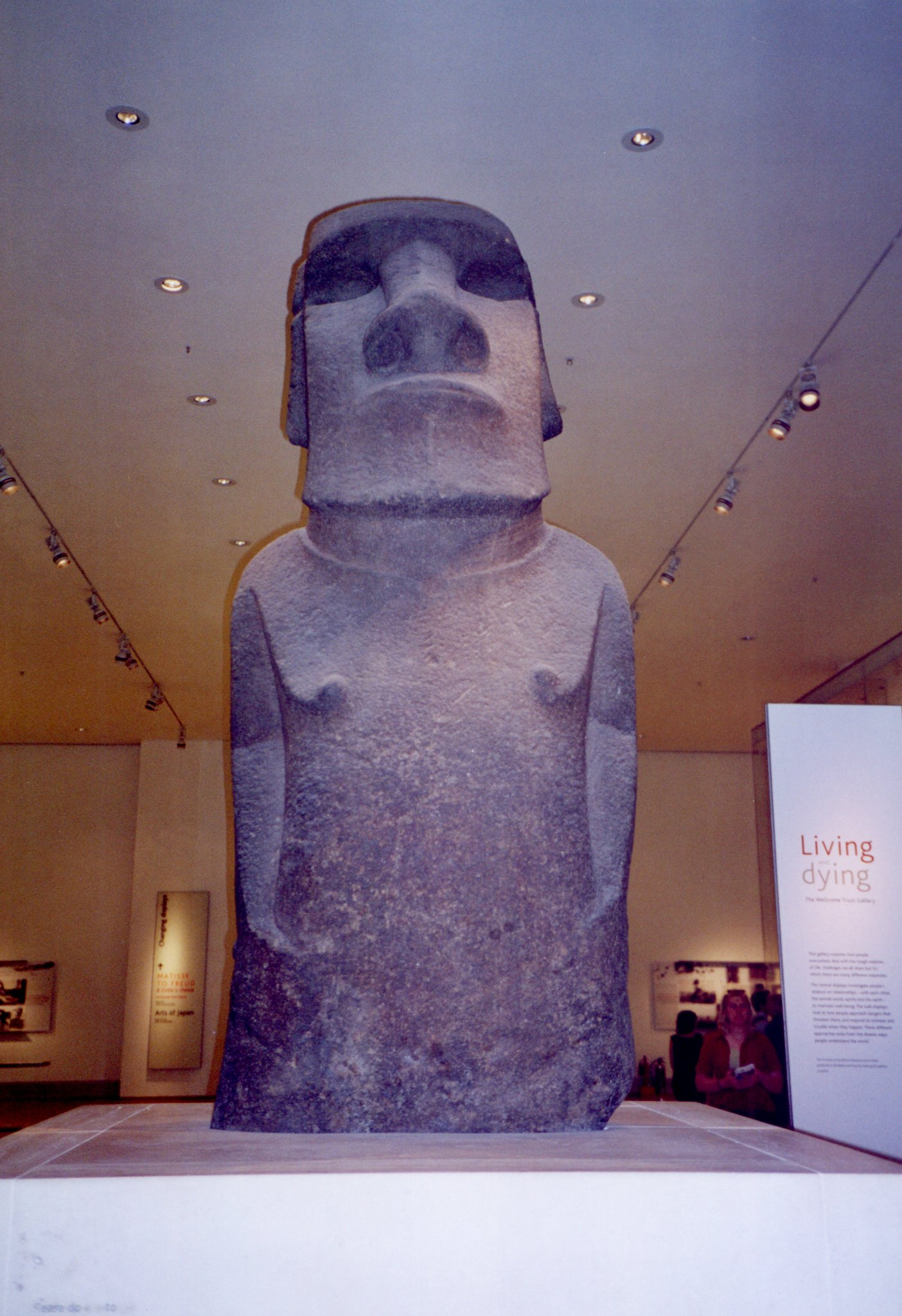 Steinfigur von der Osterinsel, Moai genannt, im British Museum in London aufgenommen.